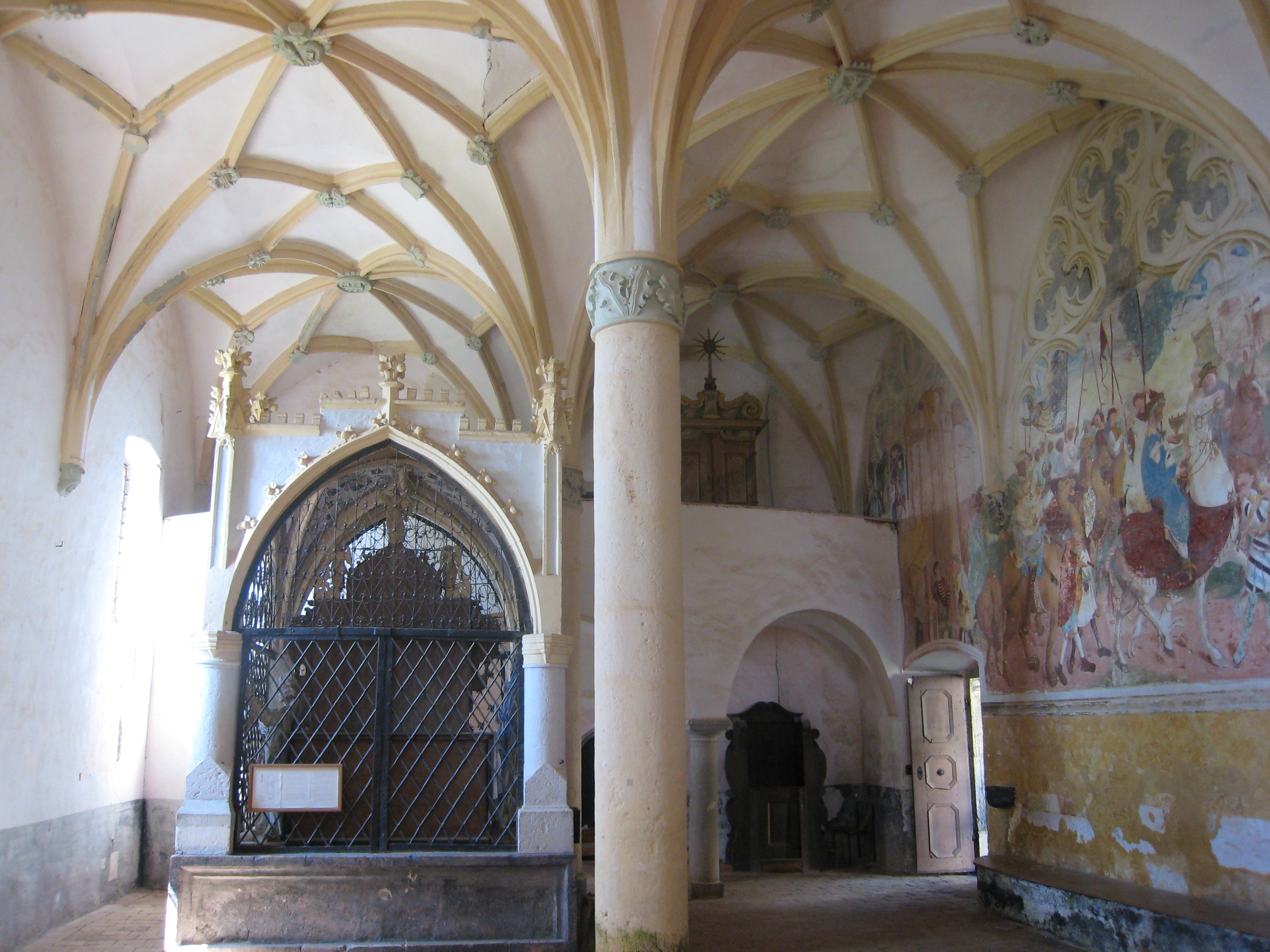 cerkev sv. Primoža in Felicijana nad Kamnikom: zahodni del ladje s kamnitim gotskim ciborijem